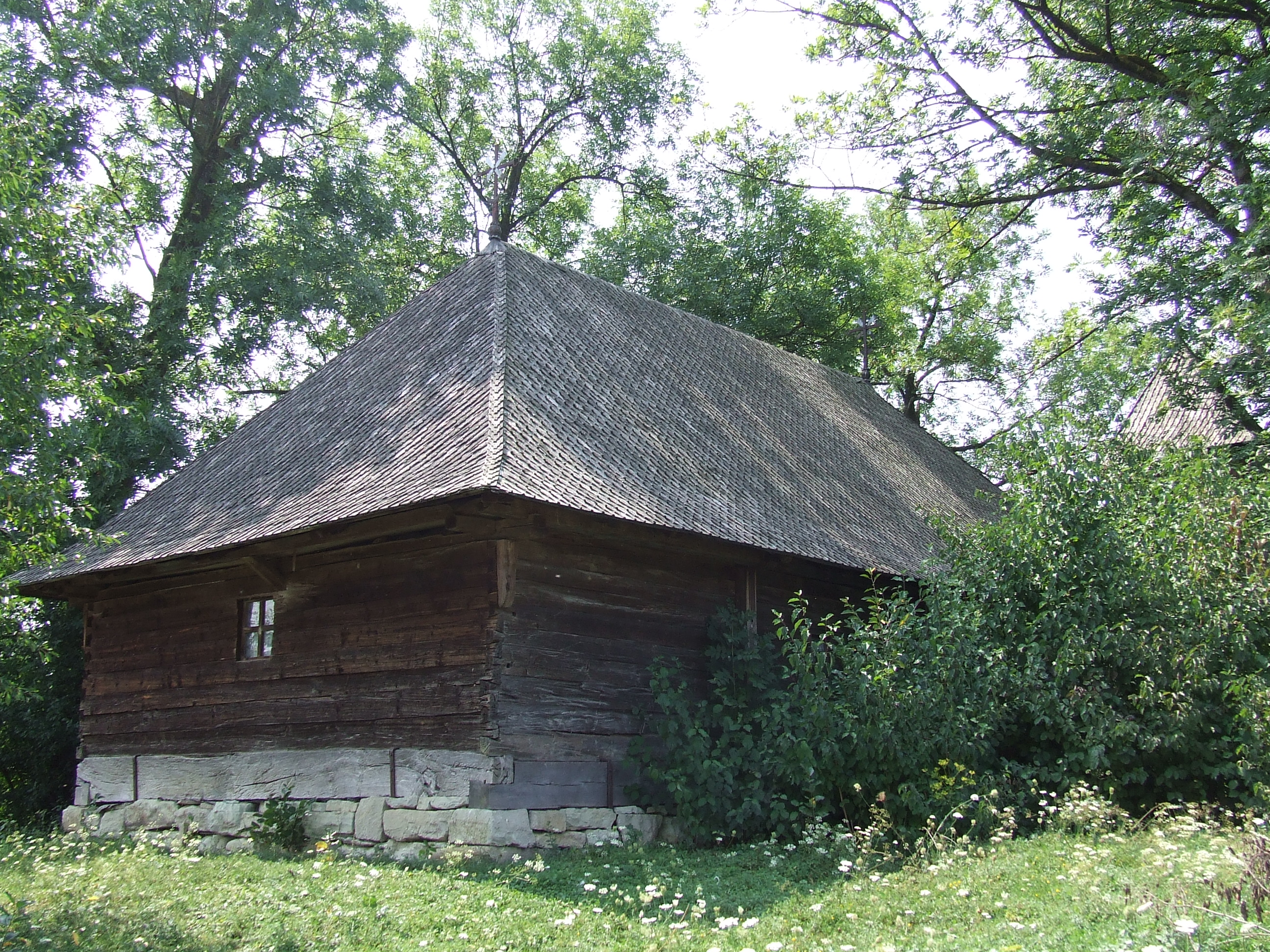 Biserica de lemn din Deag, cu hramul Sf. Arhangheli, judeţul Mureş.